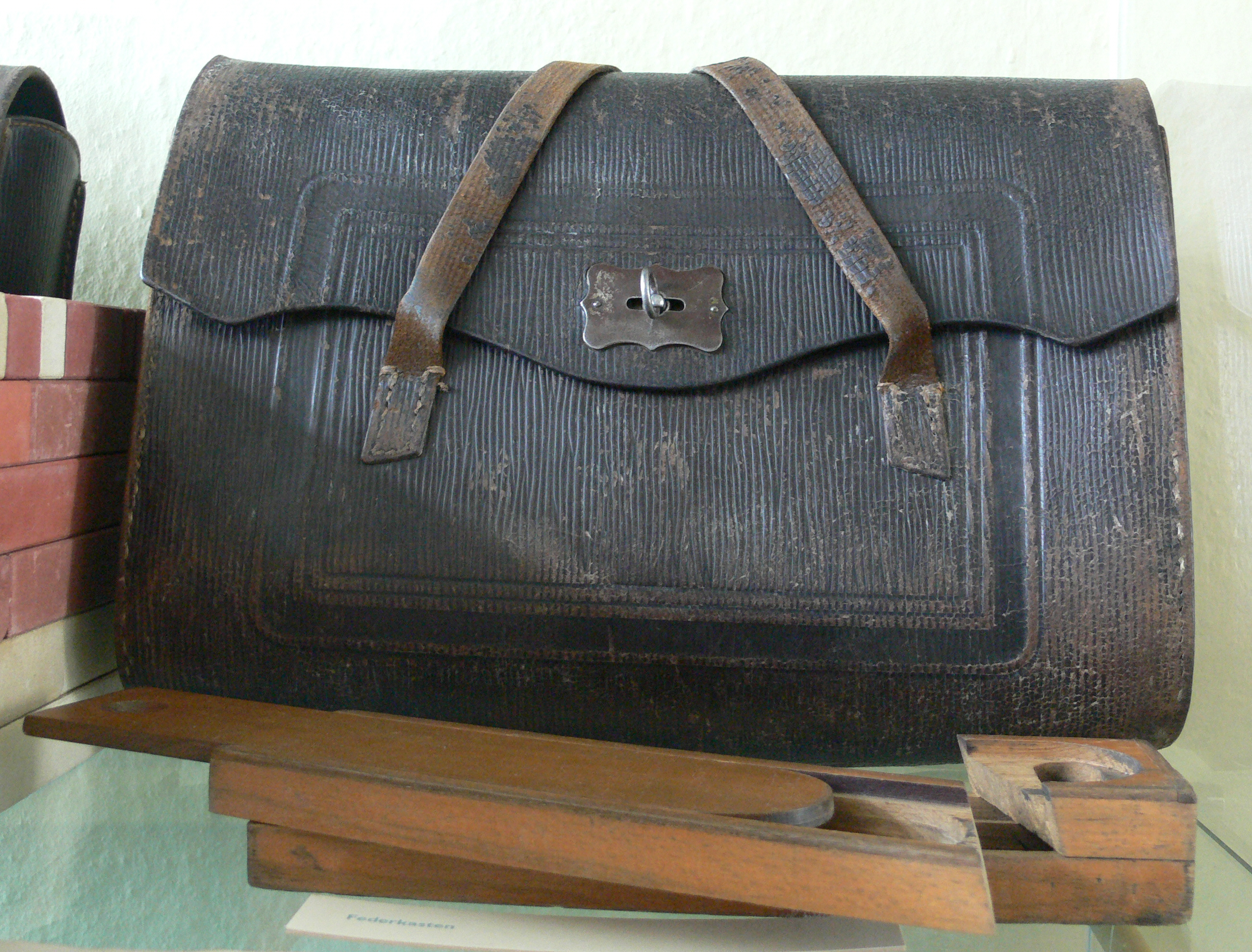 Sammlung Kindheit und Jugend (Stiftung Stadtmuseum Berlin) Schulranzen und Griffelkasten